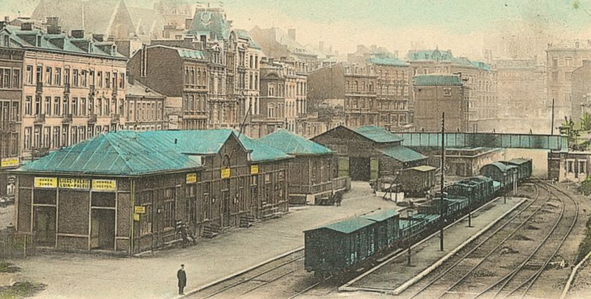 La première gare provisoire de Liège-Palais, remplacée en 1904 par une gare en dure.